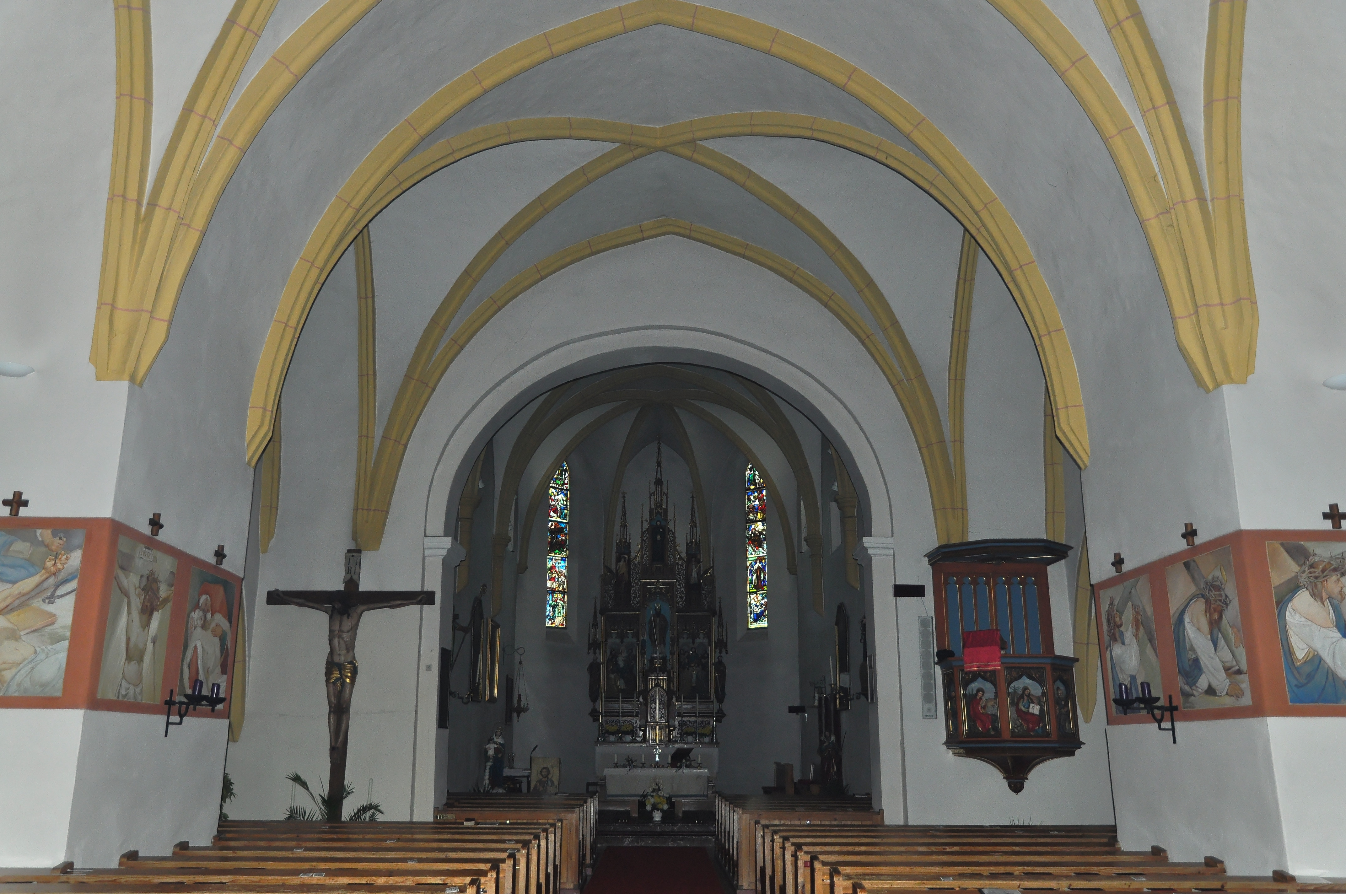 Kath. Pfarrkirche hl. Nikolaus